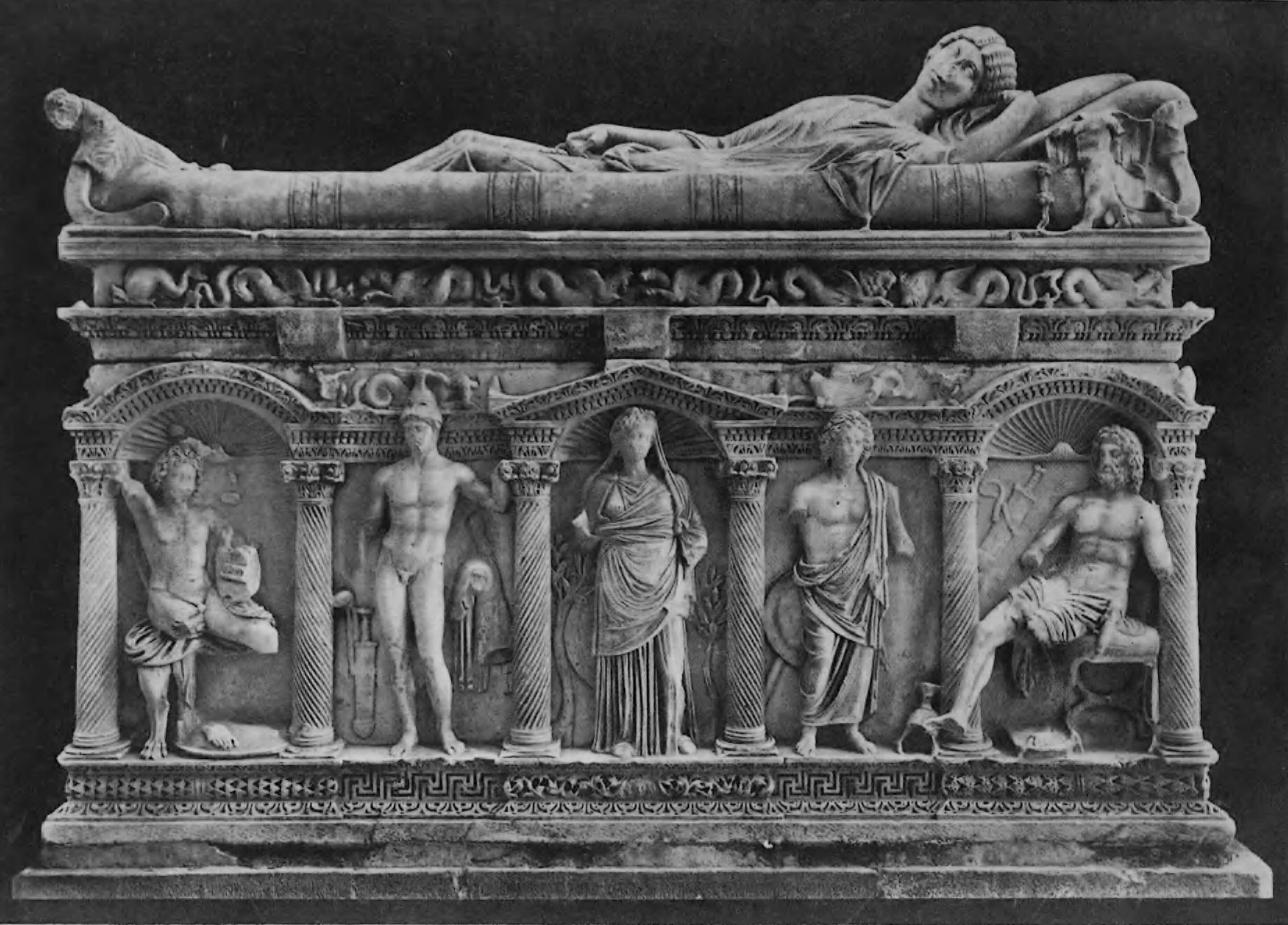 Sarcofago di Rapolla - fronte anteriore